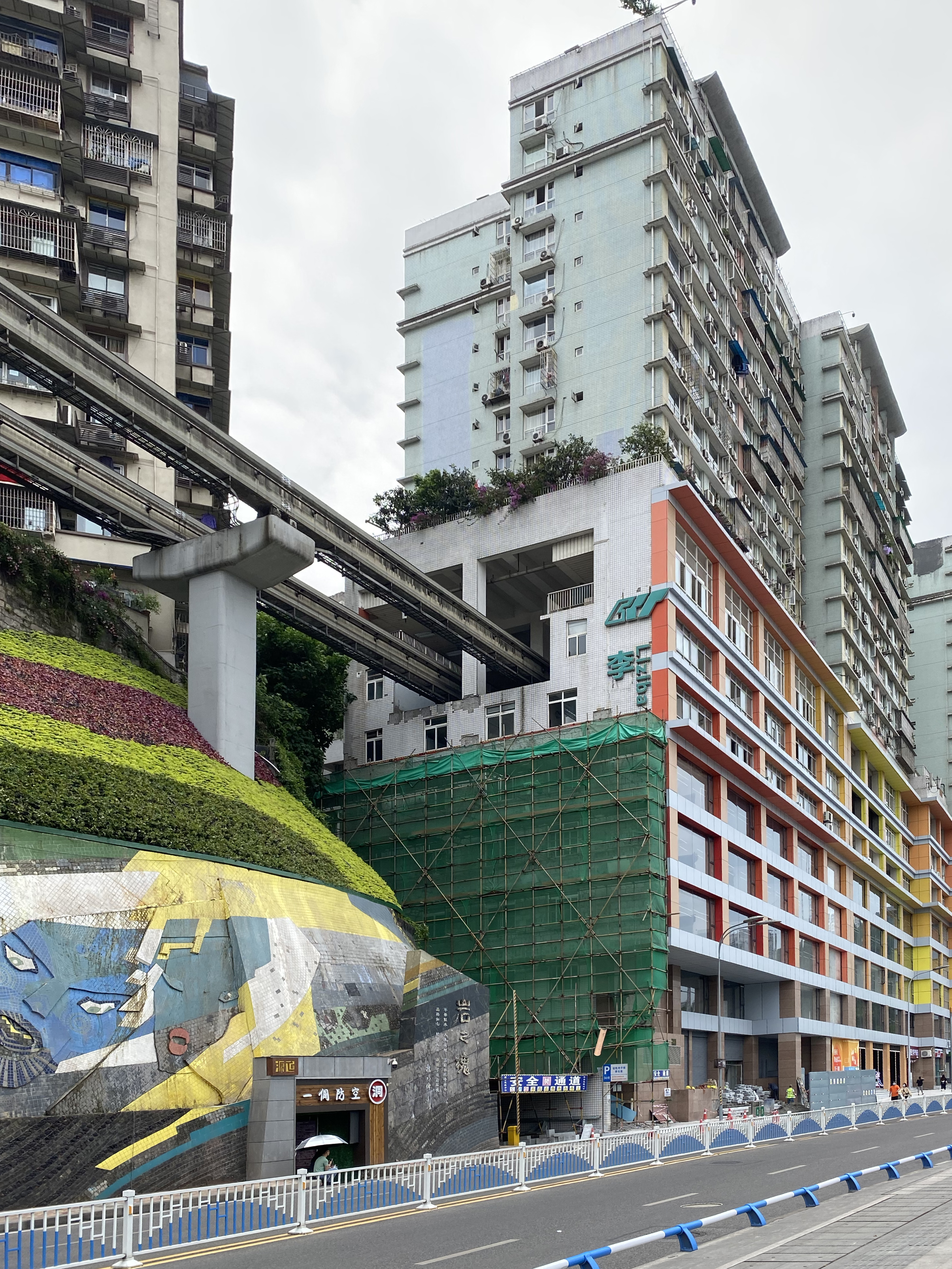 中文（中国大陆）: 4 月中旬，媒体报道李子坝站将在侧立面增设 LED 屏，显示火锅图案，呈现出轨道交通 2 号线不仅「穿楼」，还「穿火锅」的场面。但其设计及其可能造成夜间行车时司机因屏幕光出现短暂失明、眩晕危害行车安全的问题引来市民和网友的质疑和吐槽。虽然施工告示显示竣工时间为 4 月 28 日，但直至拍摄日（5 月 6 日）未见明显施工进展。相关报道可见